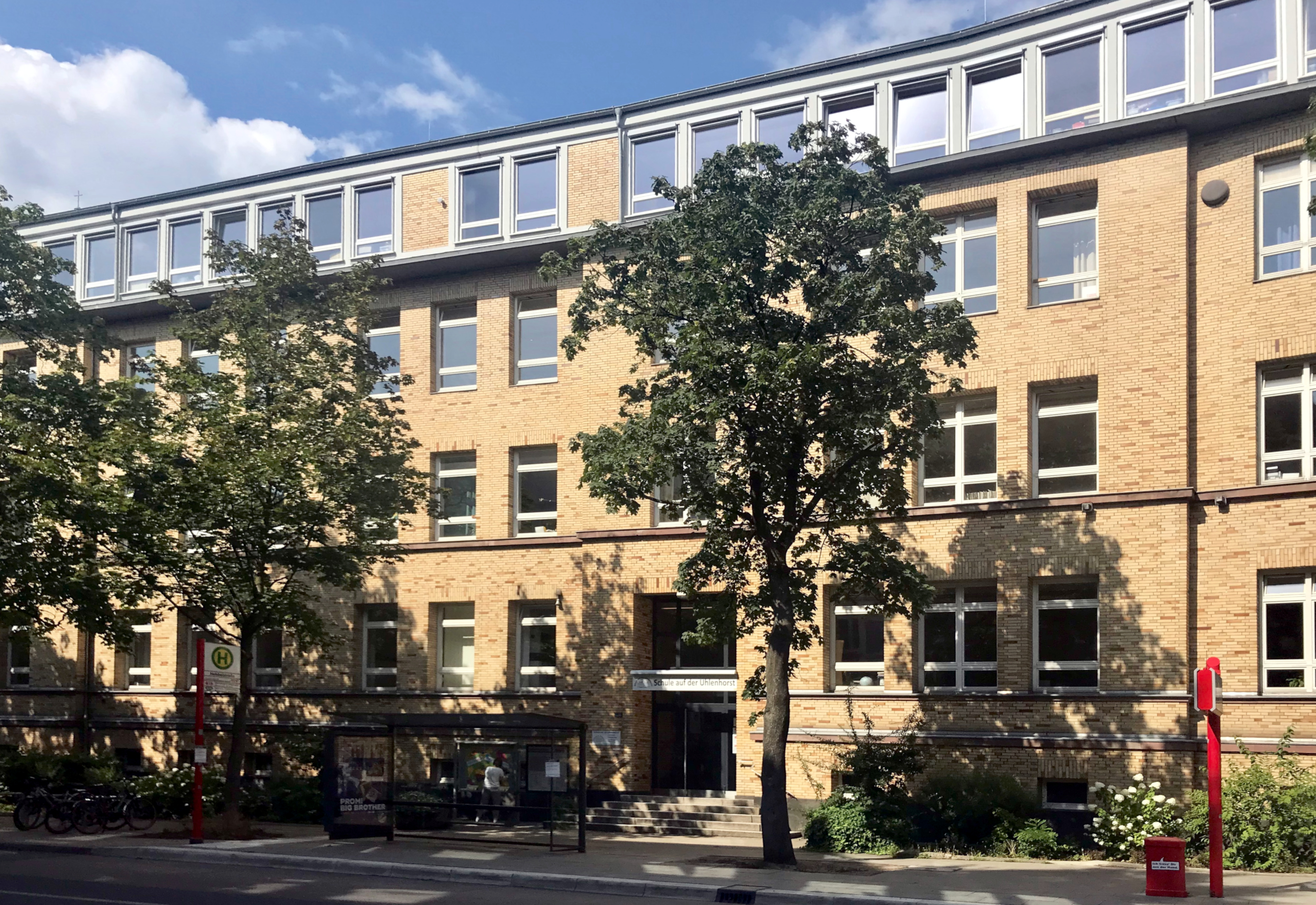 Schule auf der Uhlenhorst in Hamburg, frontale Ansicht der Fassade zum Winterhuder Weg